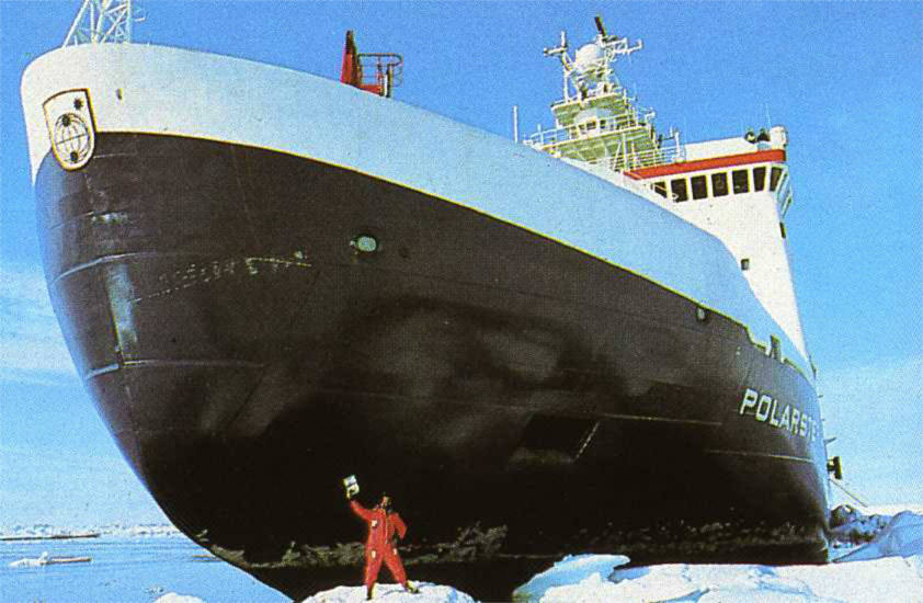 Versorgung der Neumayer-Station II mit dem Forschungsschiff Polarstern in der Weddel See